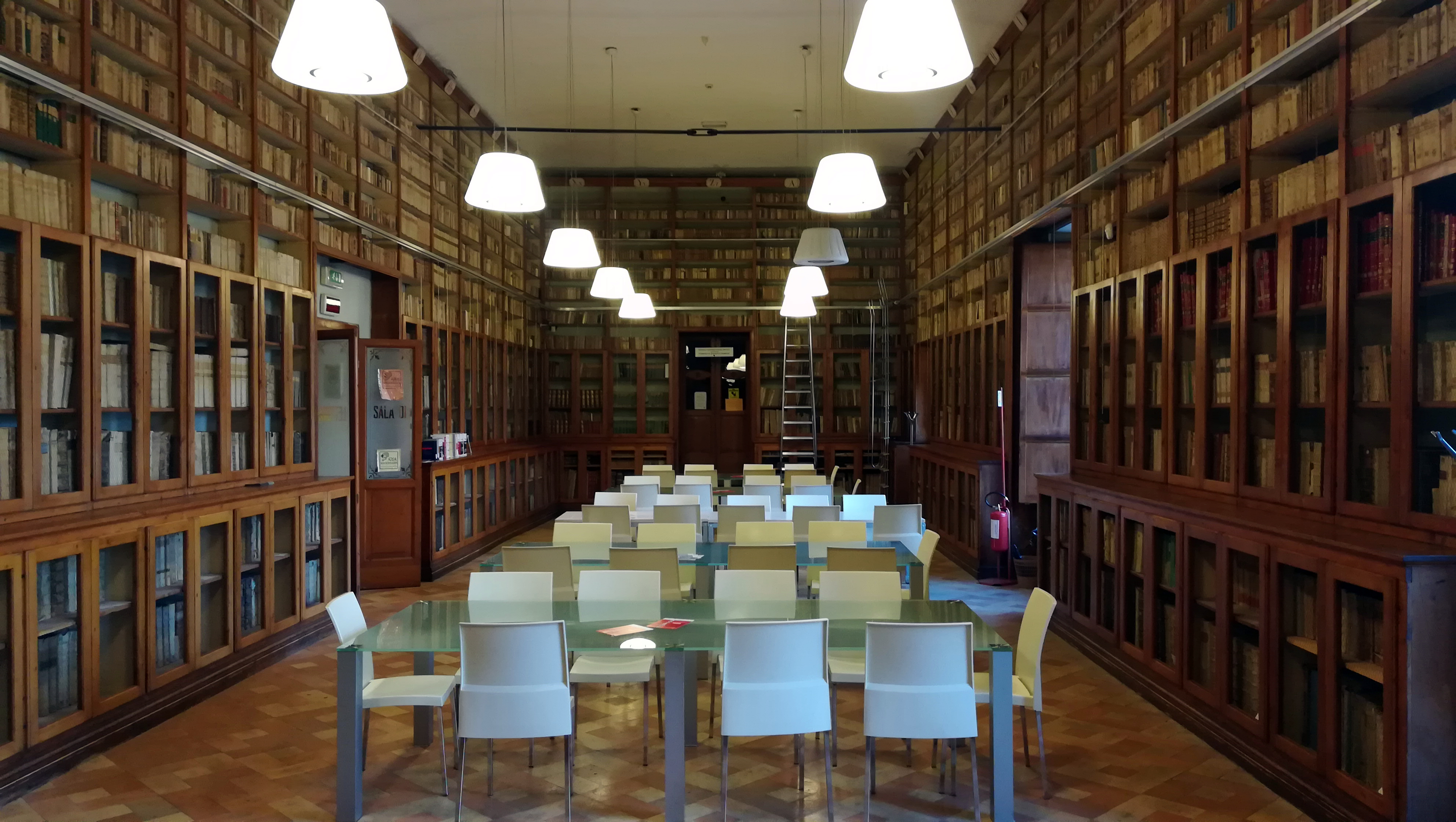 La Sala Studio della biblioteca Spezioli